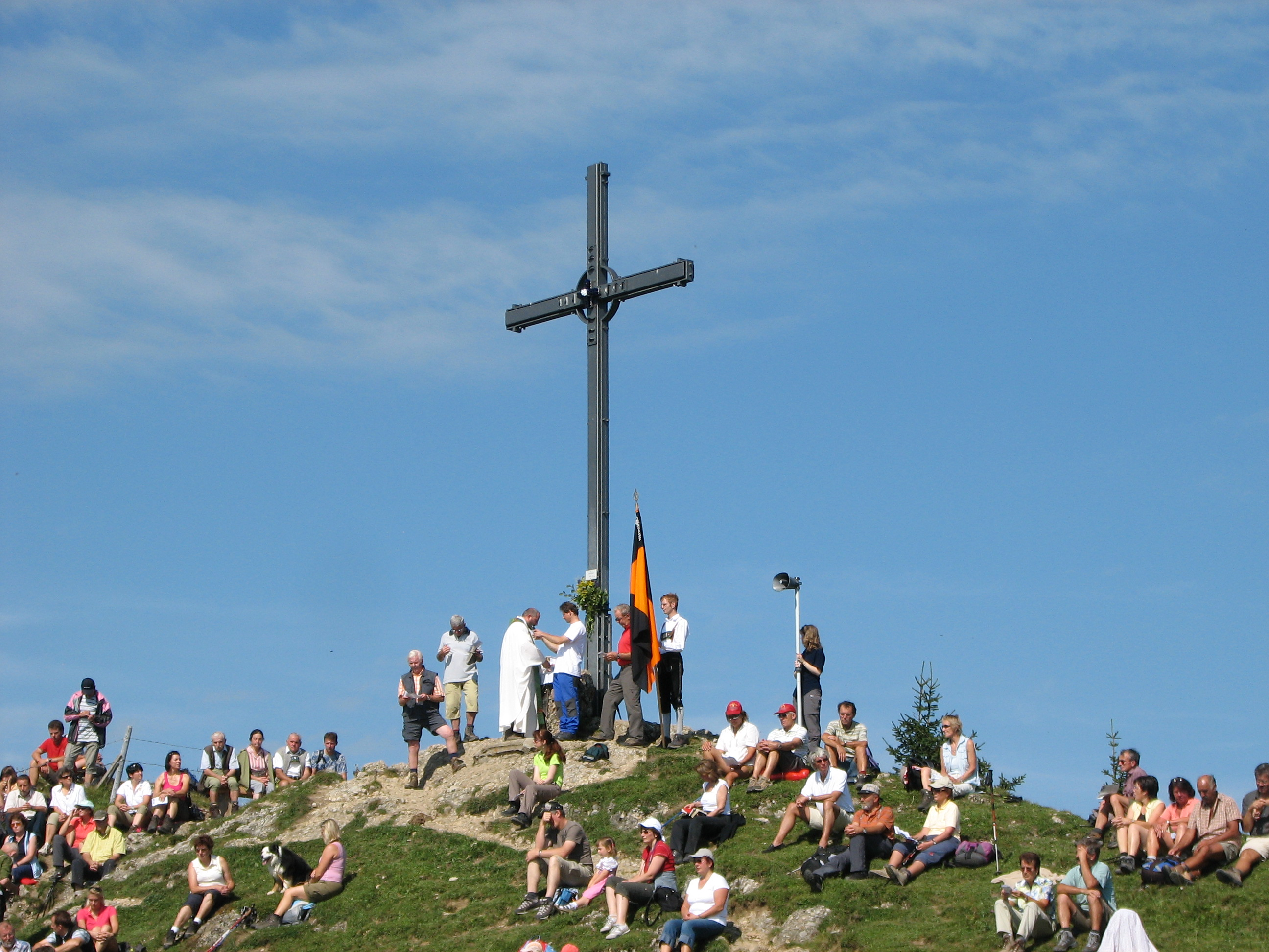 Abbildung des Gipfelkreuzes auf dem Seelenkopf während der Bergmesse.